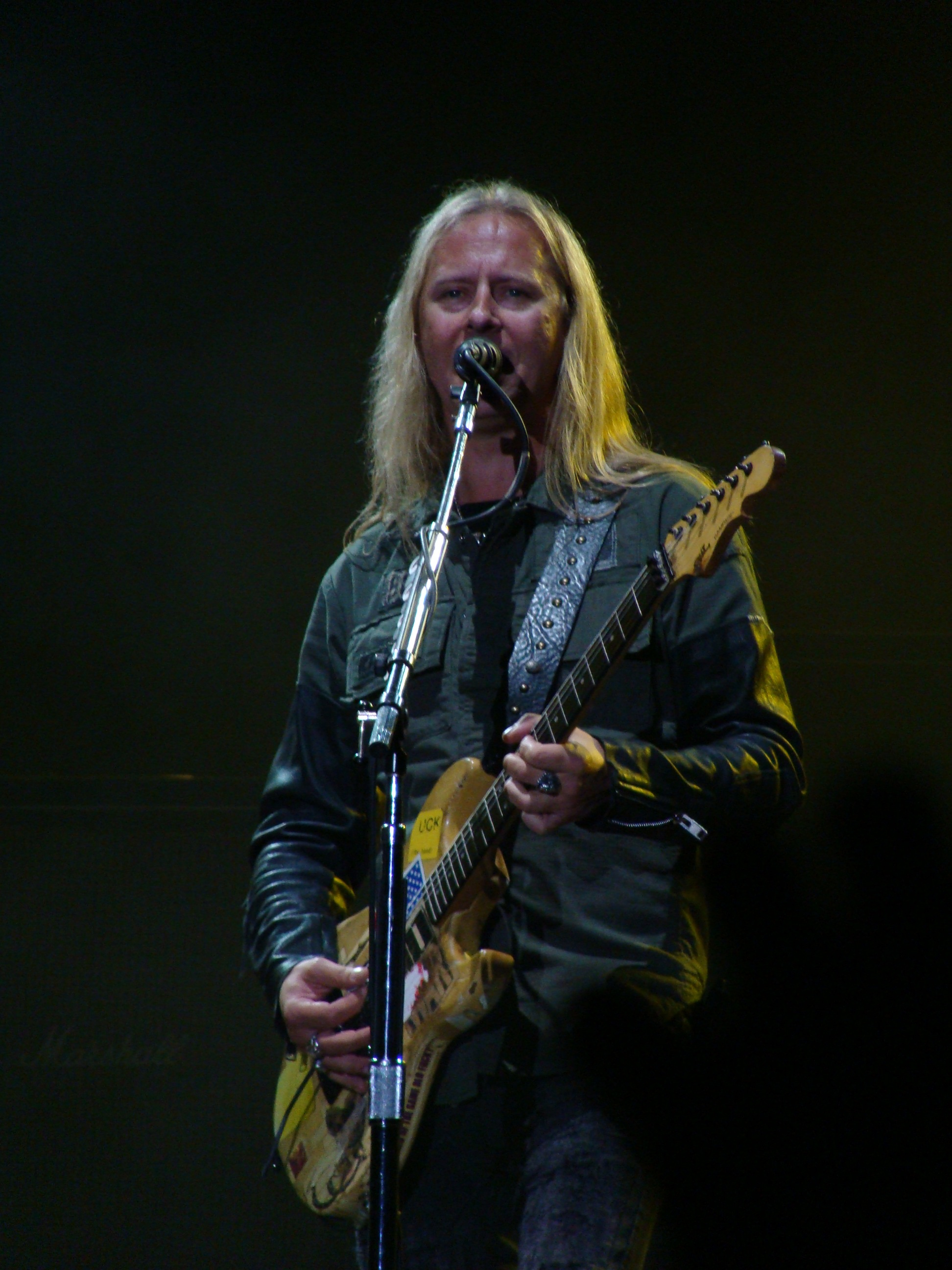 Jerry Cantrell guitarrista de Alice in Chains actuando en el festival BBK Live de Bilbao (España).